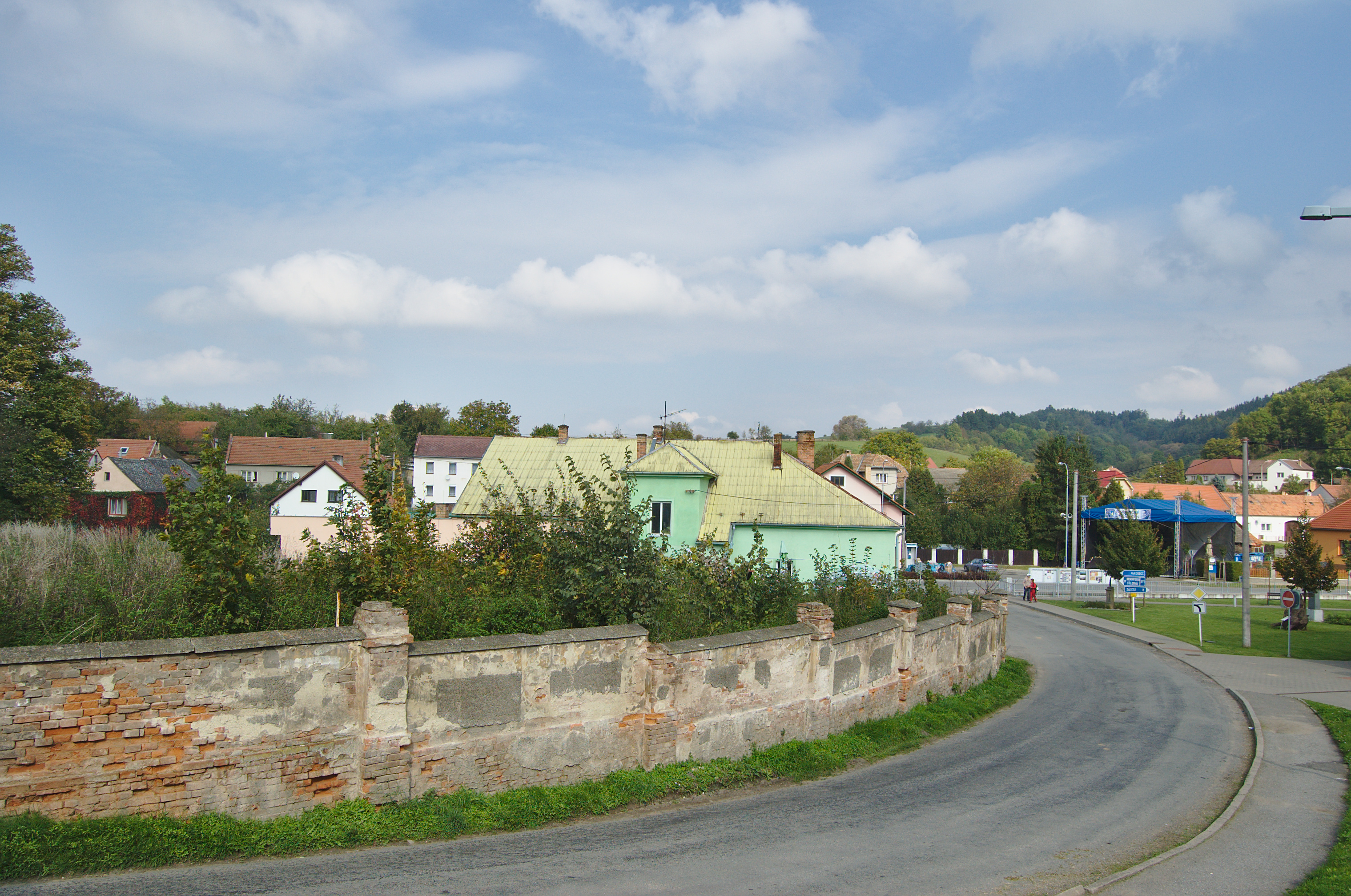 Pohled na vesnici od zámku, Biskupice, okres Svitavy